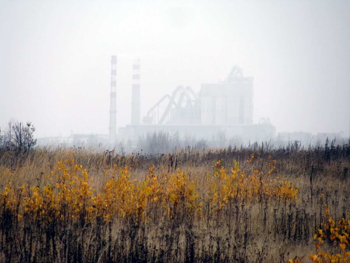 Завод в тумане. Костюковичи. Plant in a fog. Kostukovichi.